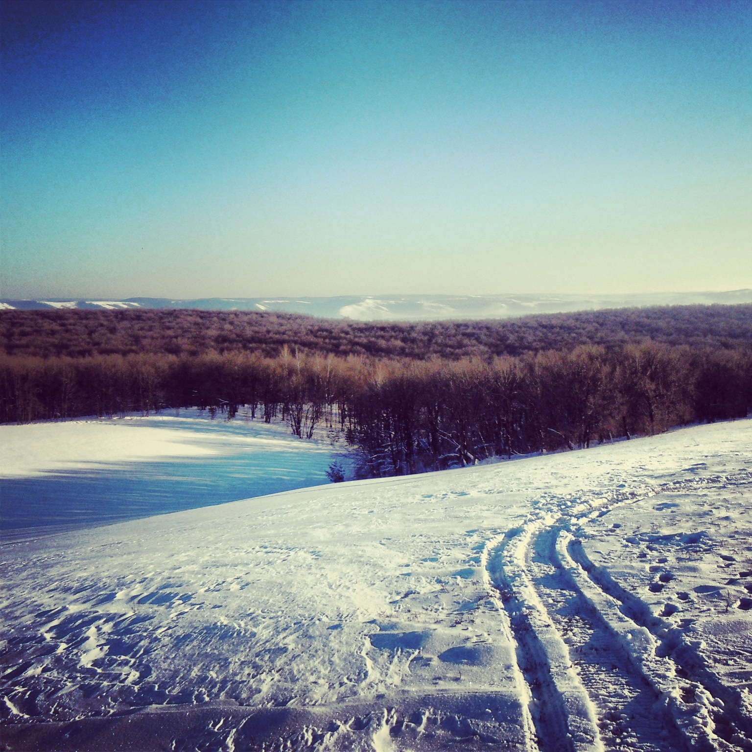 Башкирия, национальный парк, Мелеузовский район This image is related to the protected area of Russia number 0200098